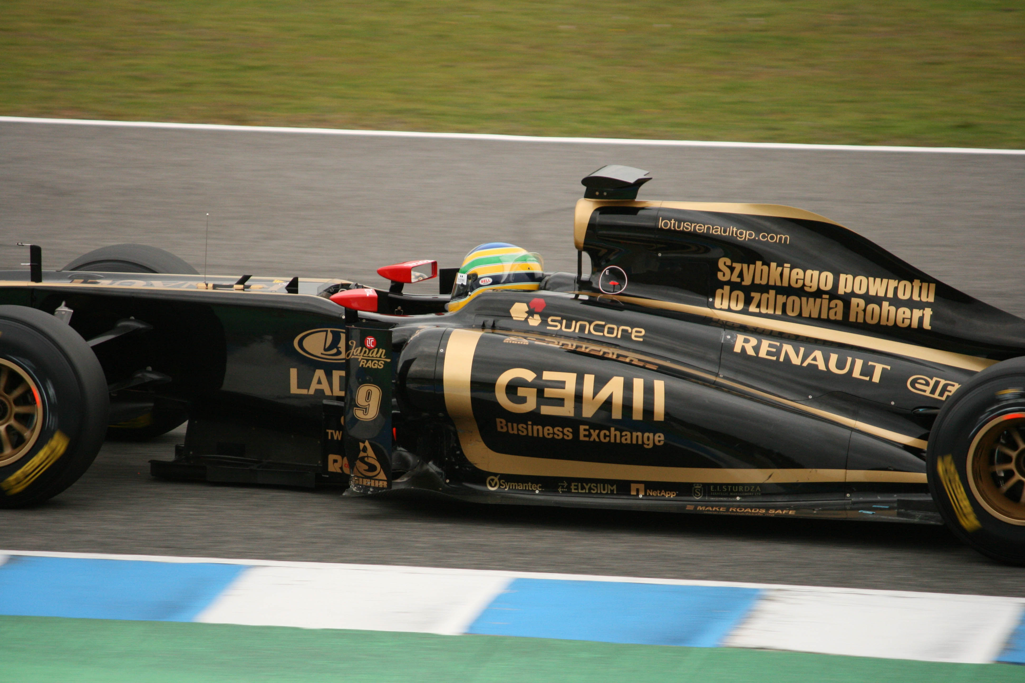 Bruno Senna